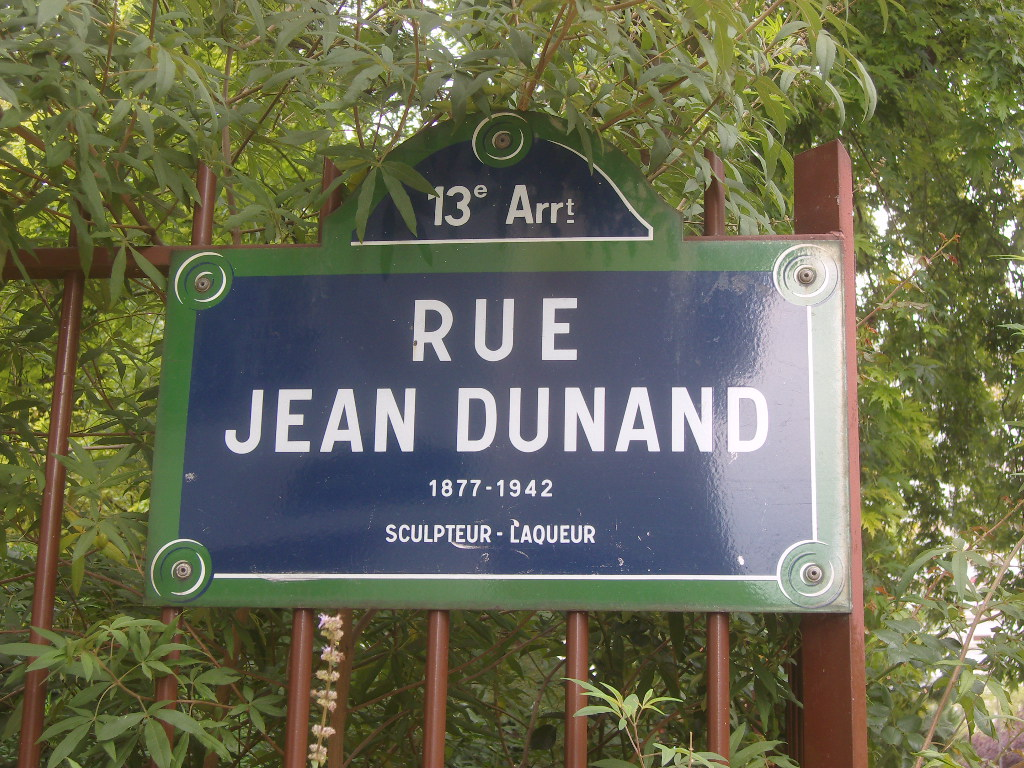 Paris 13e arrondissement, rue Jean-Dunand, plaque de rue